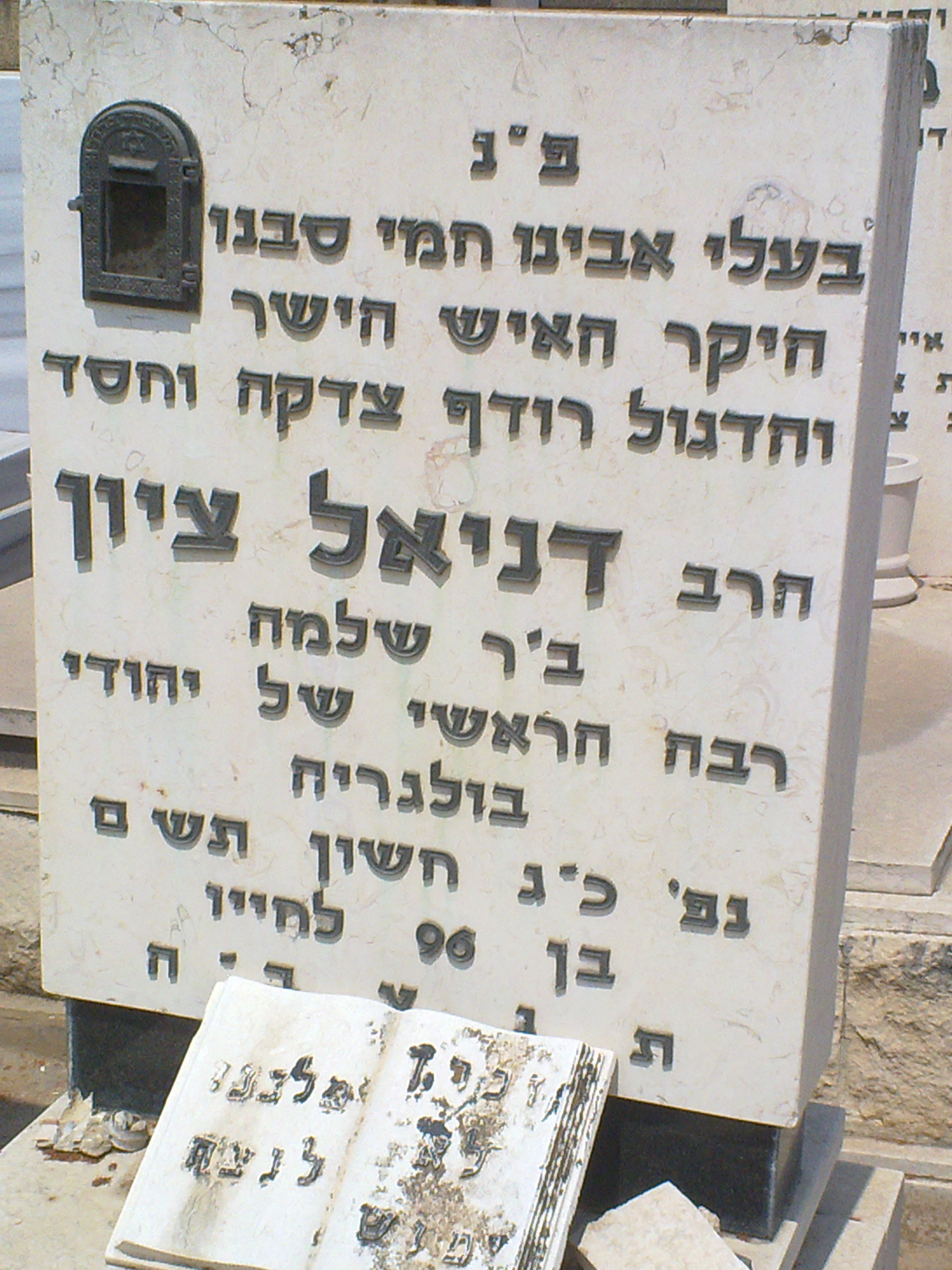 מצבת קברו של הרב דניאל ציון (1883 - 1979), רבה הראשי של יהדות בולגריה